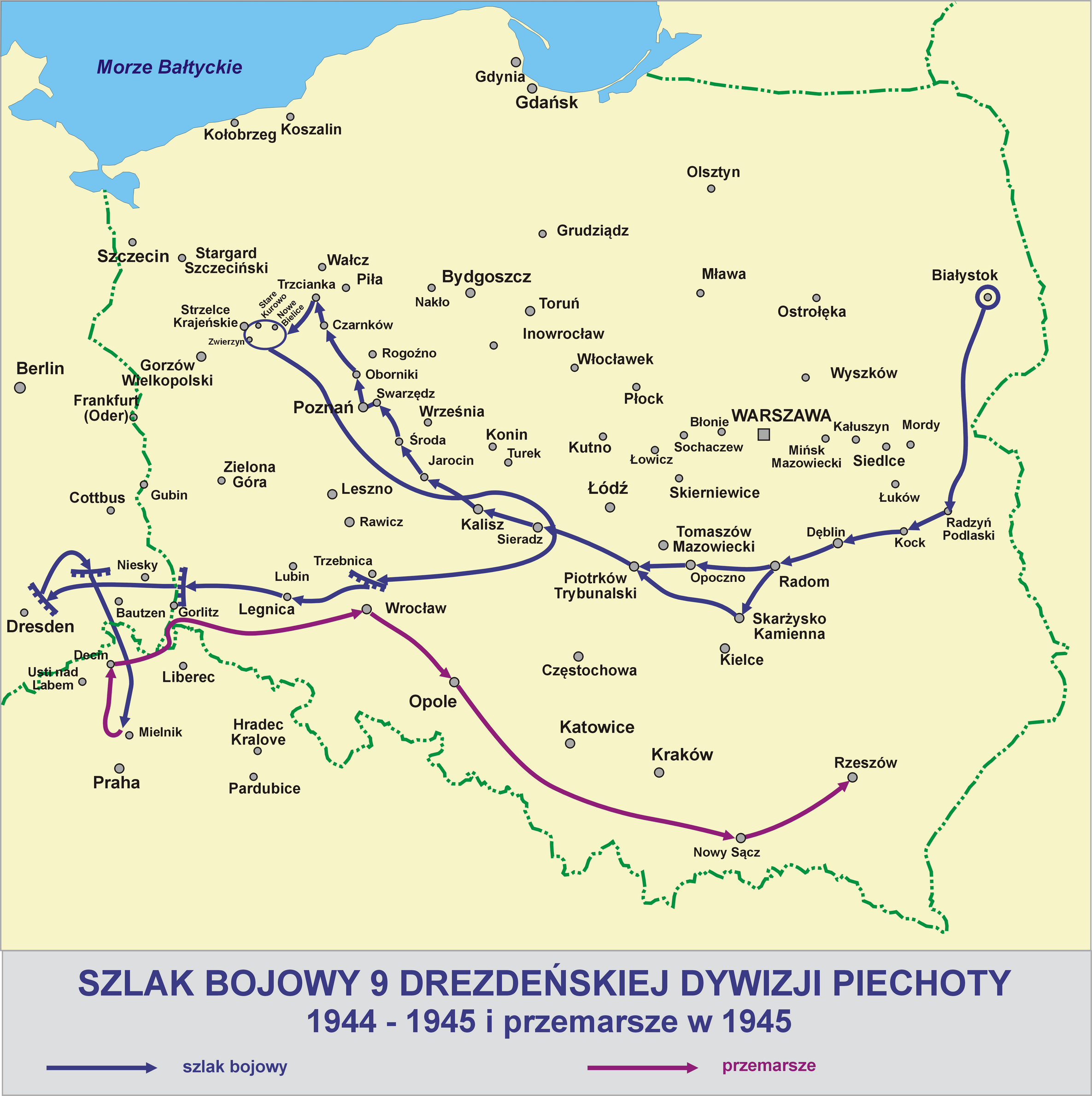 Szlak bojowy 9 Drezdeńskiej Dywizji Piechoty 1944 -1945 i przemarsze w 1945